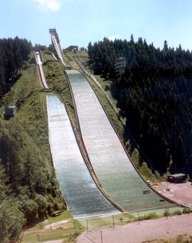 Hans-Renner-Schanze bei Oberhof